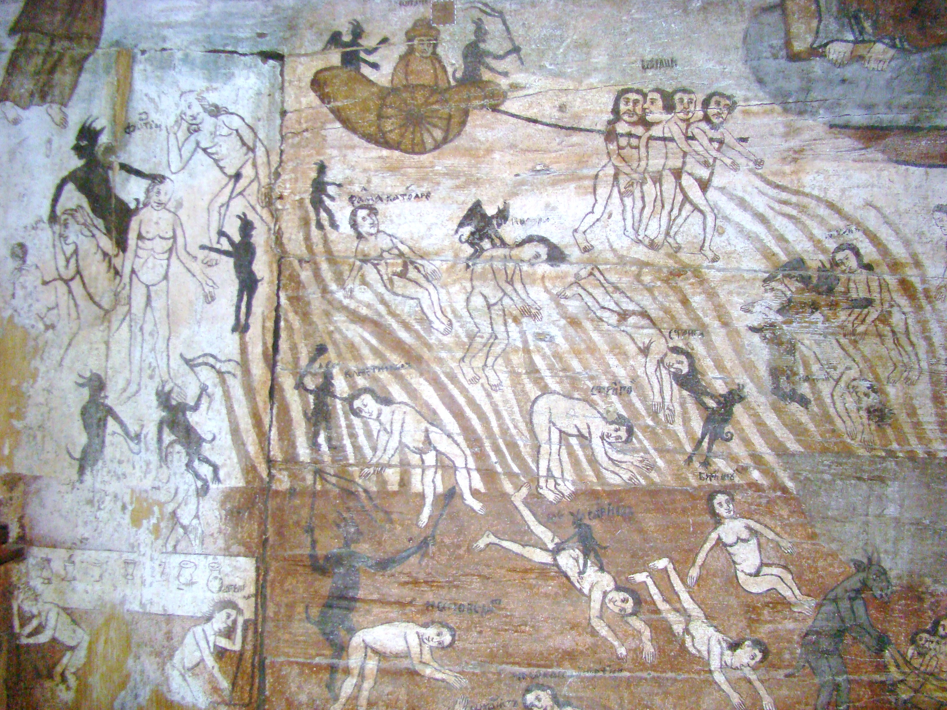 Biserica de lemn "Sfântul Nicolae", sat BOGDAN VODĂ